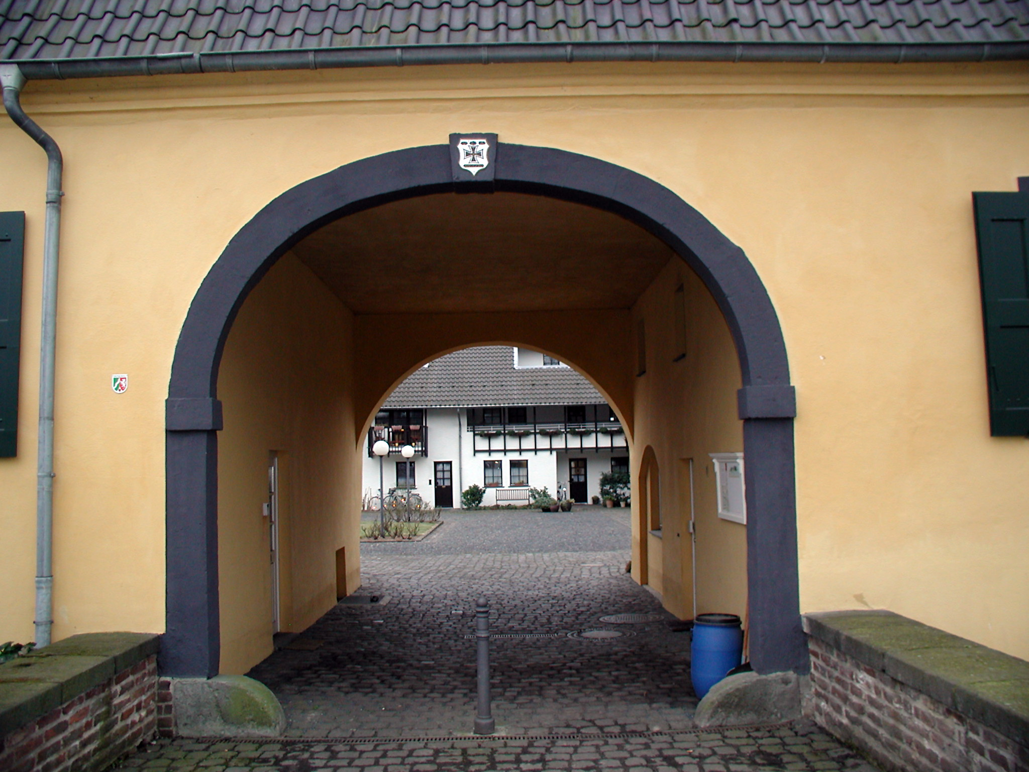 Palmersdorfer Hof, Brühl. Herrenhaus, Wappen des Deutschen Ordens (1750)